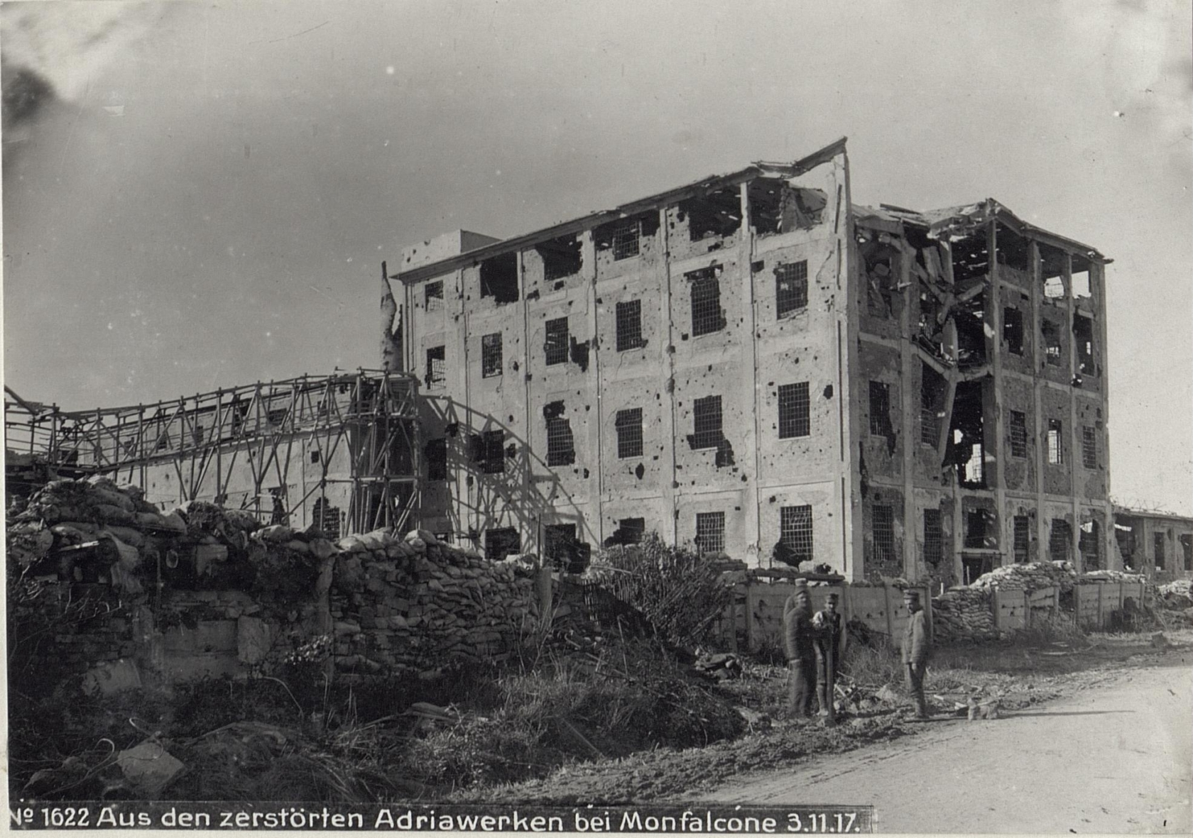 Aus den zerstörten Adriawerken bei Monfalcone 3.11.17.